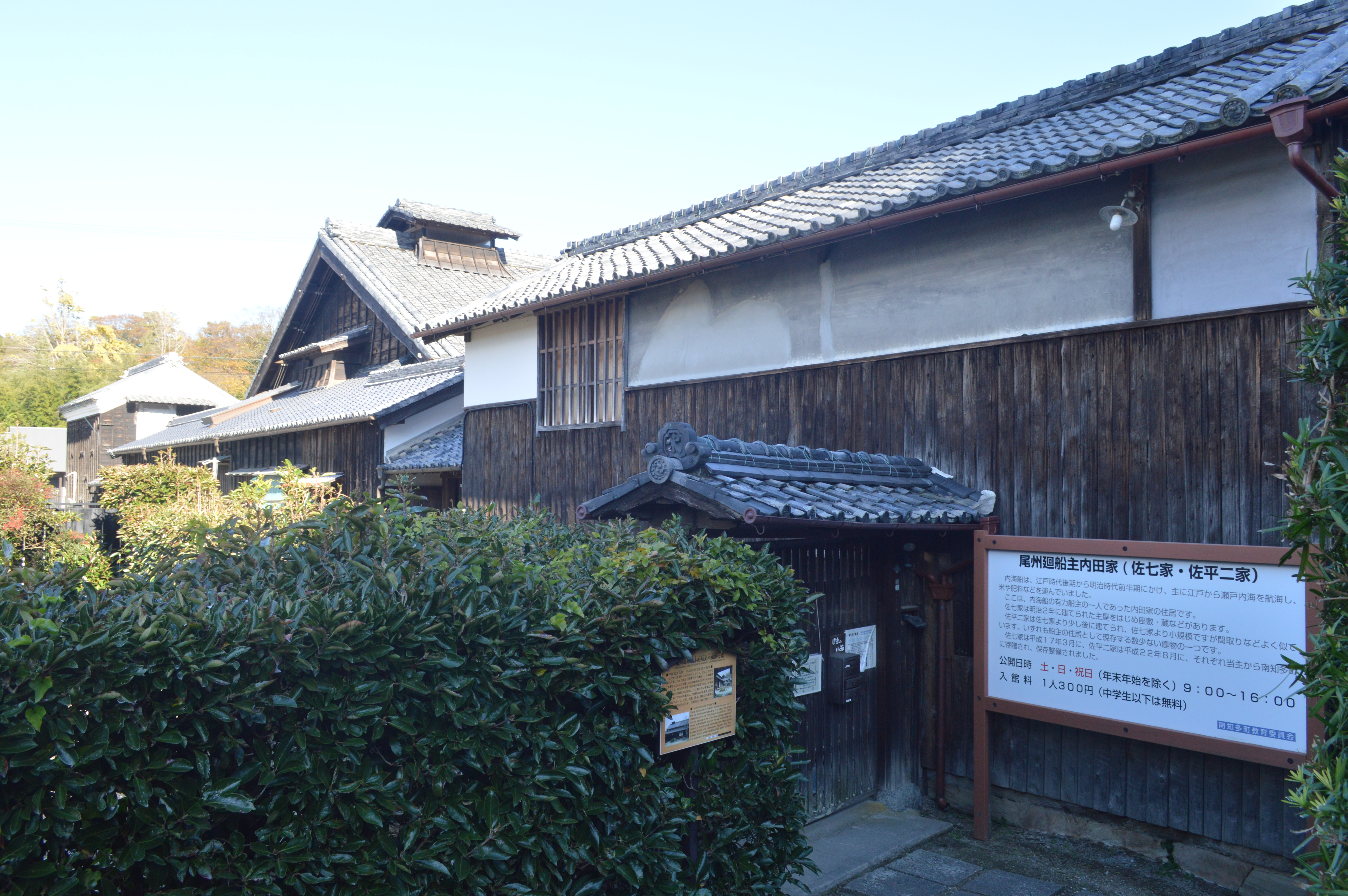 愛知県知多郡南知多町にある「尾州廻船内海船船主 内田家」。国の重要文化財（2017年指定）。